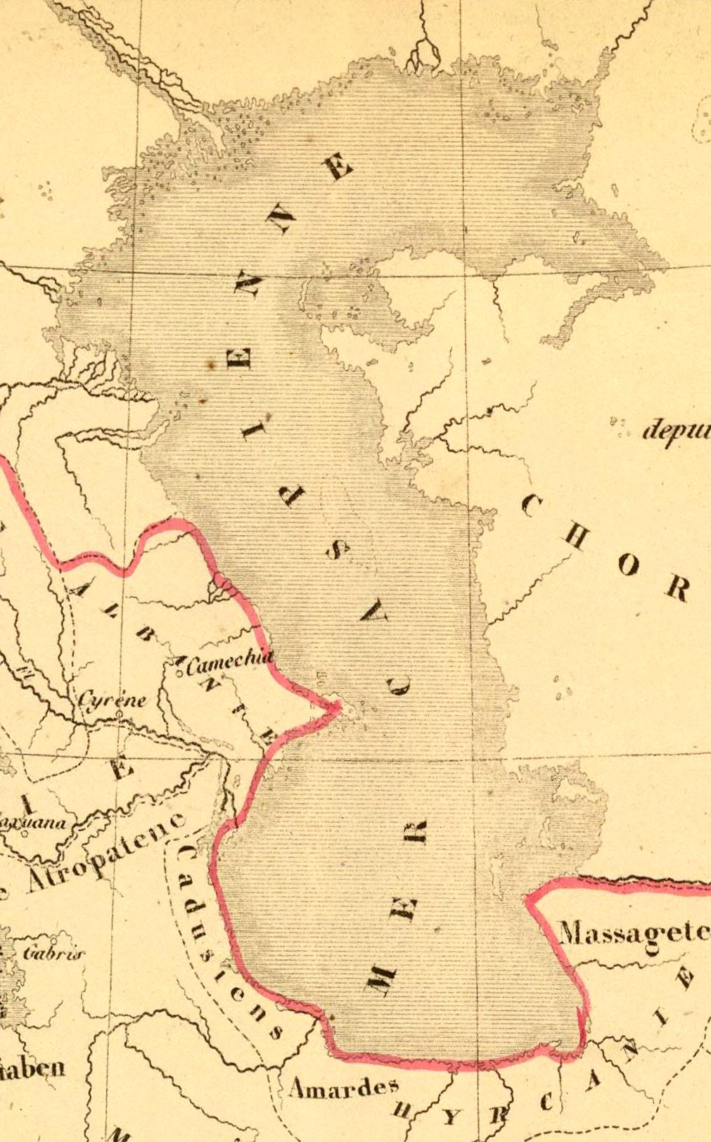 Carte de l'Empire des Perses. Pour servir a l'intelligence des livres d'Esdras, de Nehemias, de Tobie, de Judith, d'Esther, de Job et des Prophetes. Depuis 588 jusqu'a 536 avant J.C. epoque ou finit la captivite. Dressee sous la direction de A. Houze. (In upper margin:) Atlas histque. (et) geogque. de la Terre Sainte. Carte VIII. (Paris, Chez P. Dumenil, editeur, rue des Beaux-Arts, 10. 1844)